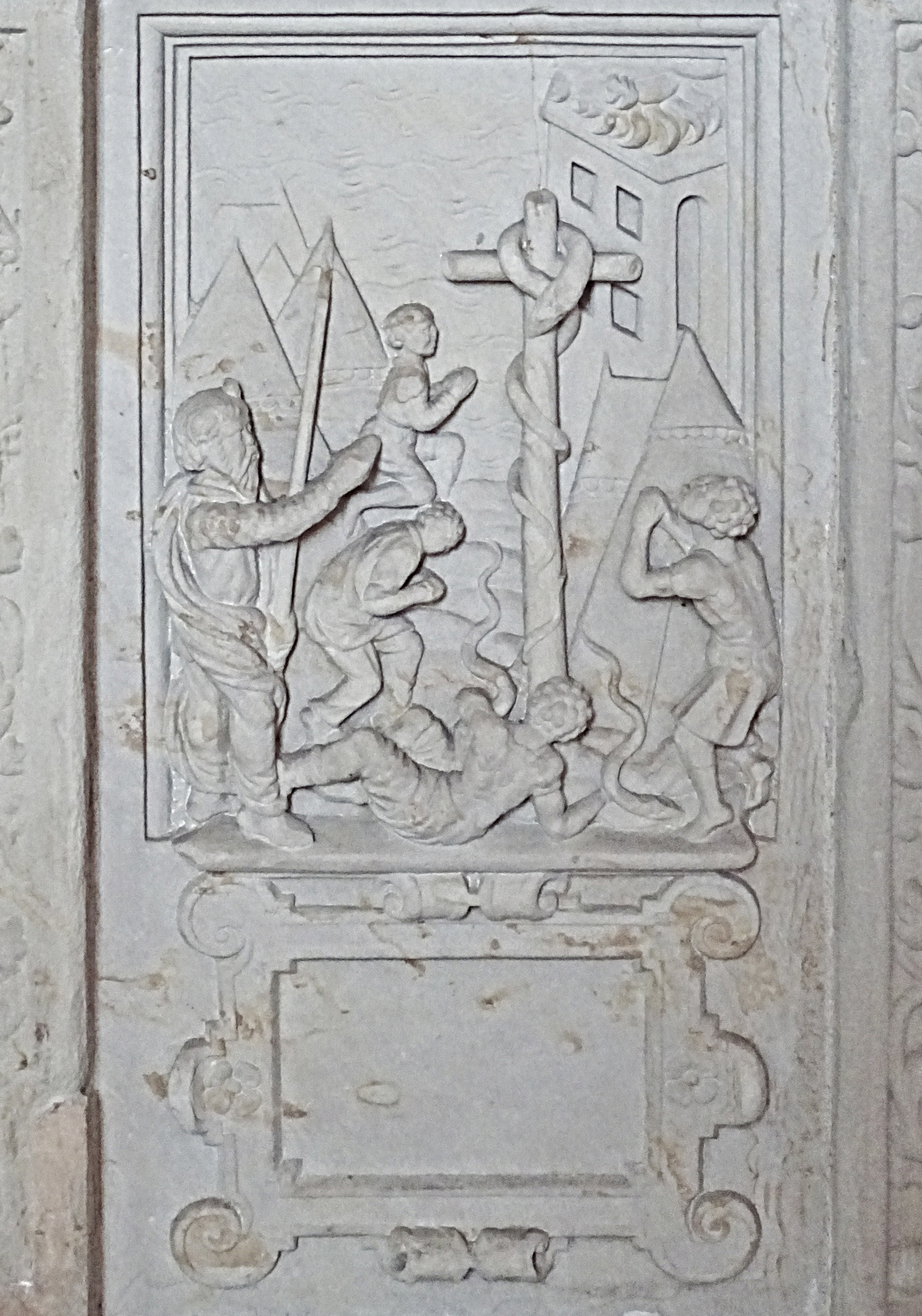 Steinbilderbibel in der St. Annenkirche (Eisleben), 19/29, Erhöhung der ehernen Schlange